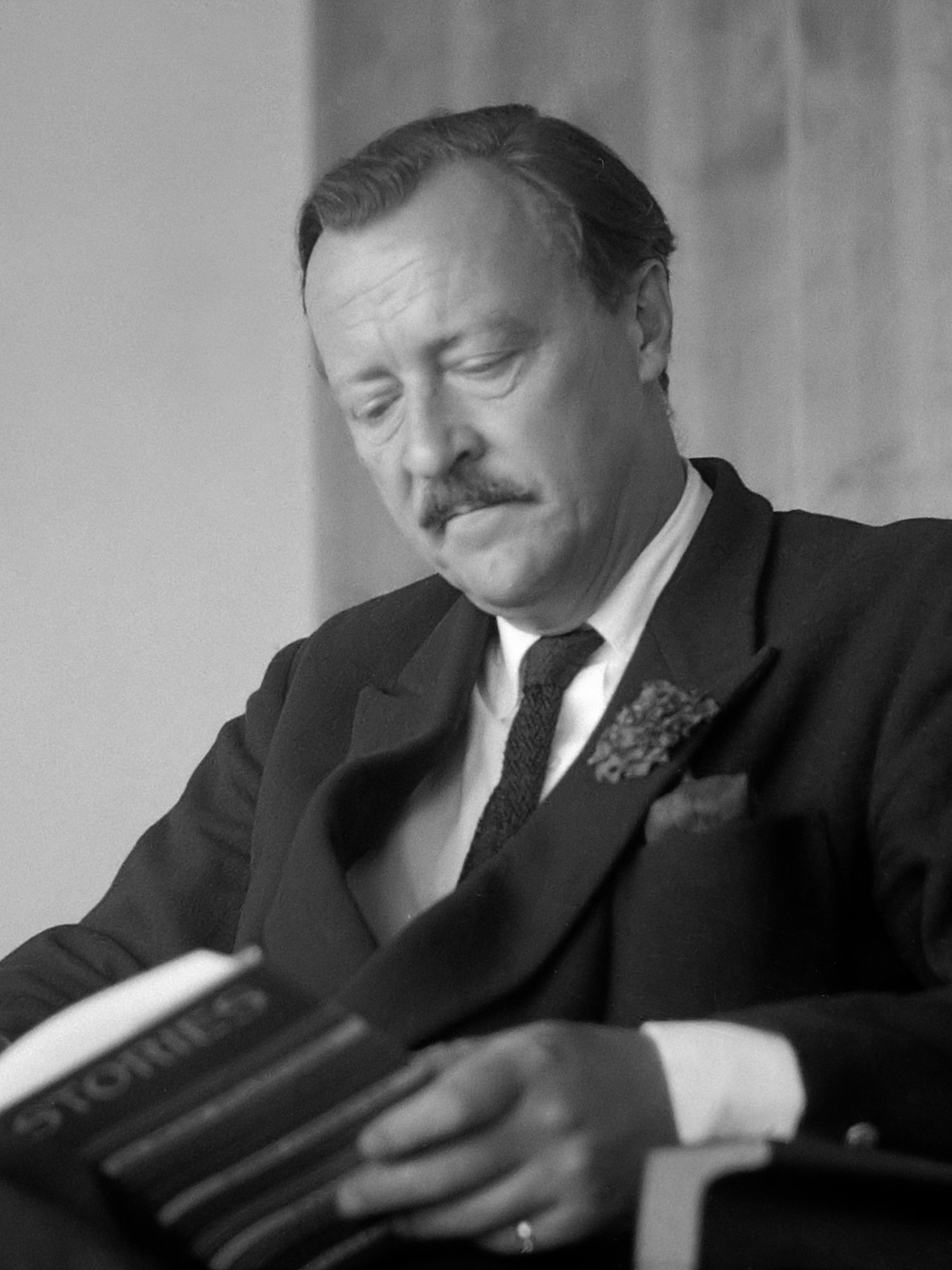 Prins Aschwin op Schiphol 4 juli 1961